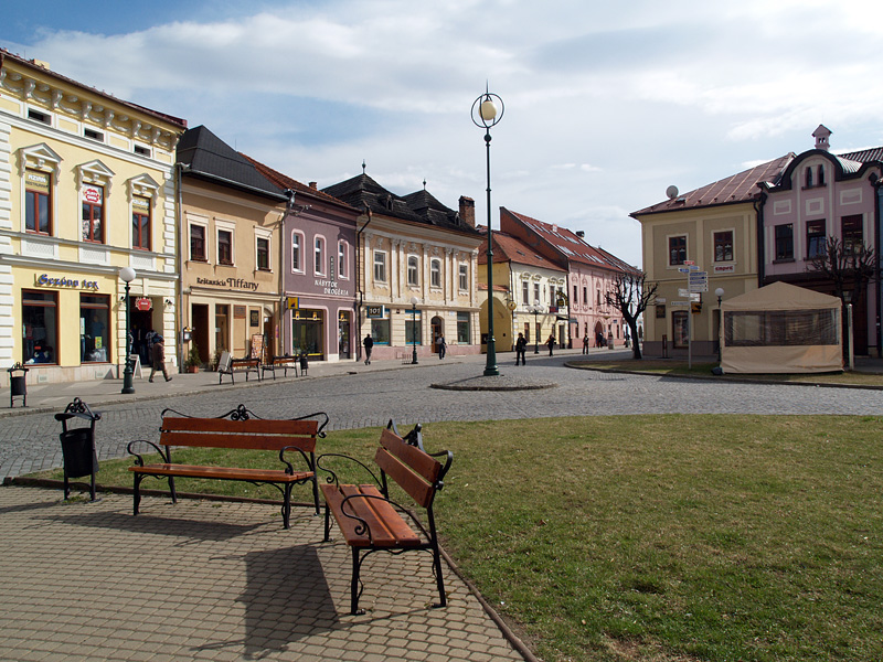 Kežmarok - Hlavné námestie